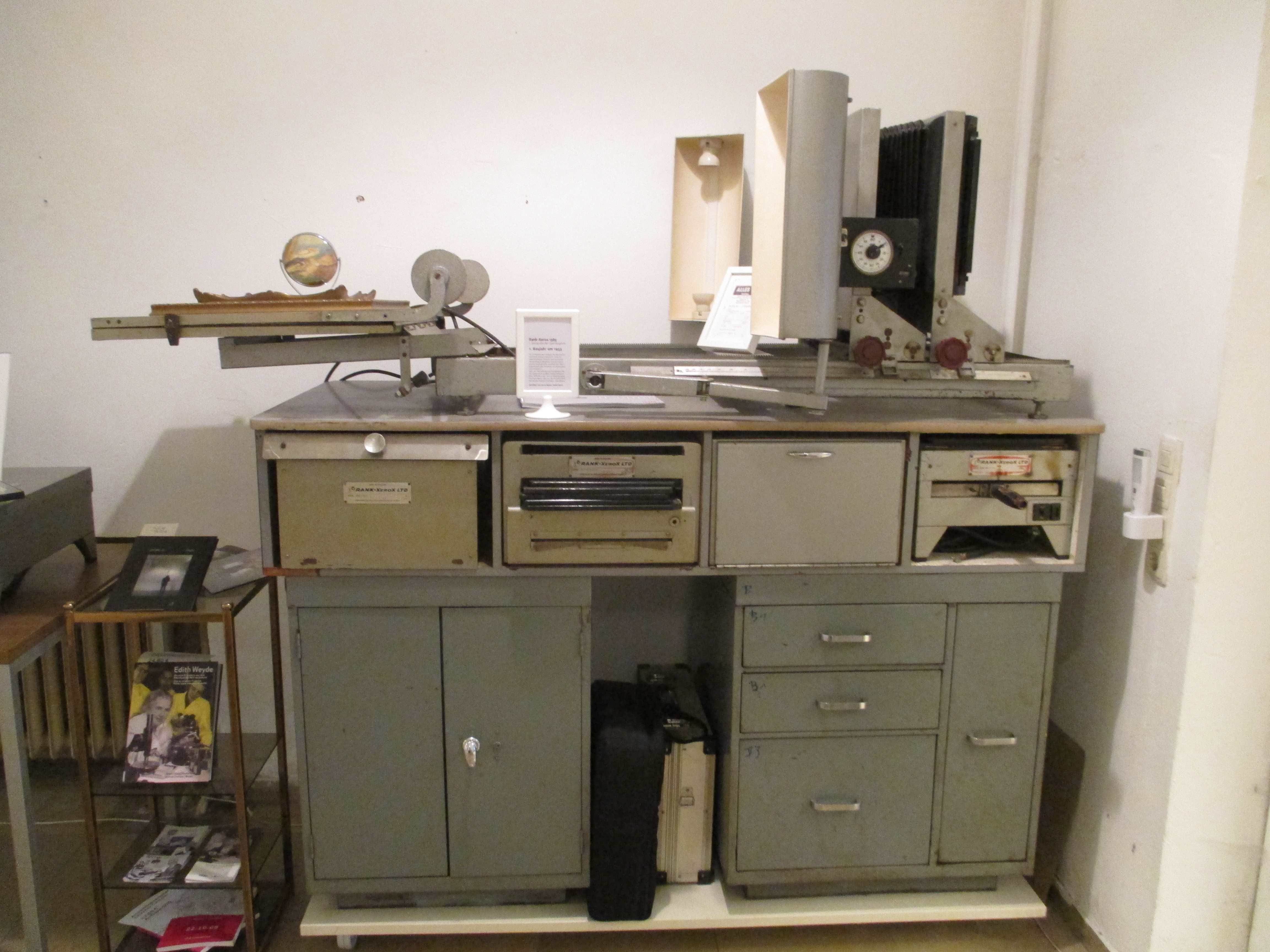 Makroscope - Useum für Fotokopie, Sammlung Urbons: Rank Xerox Reproduktionsautomat von 1953.